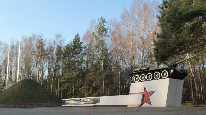 Судавіца. Курган Славы